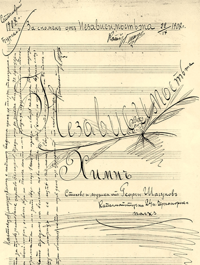 Факсимиле от началната страница на химна "Независимостта" (1908) от Георге Шагунов